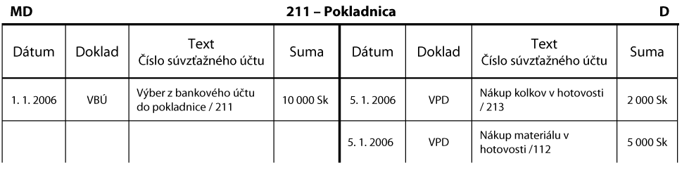 Účtovanie na účte 211 - Pokladnica.